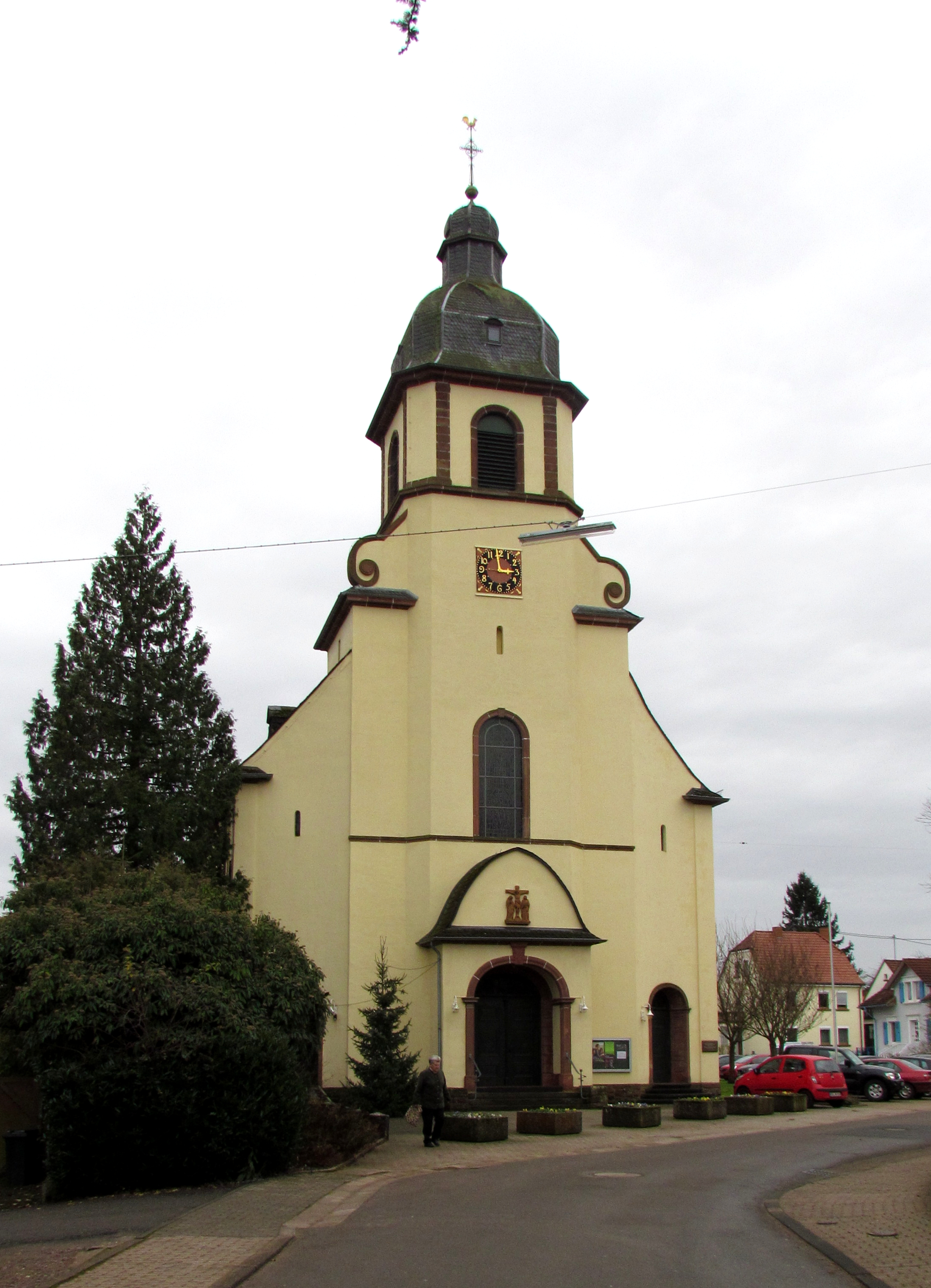 Bildinhalt: Kirche St. Laurentius Aufnahmeort: Schwemlingen, Deutschland